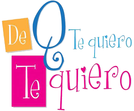 Logotipo de la telenovela De Que Te Quiero, Te Quiero